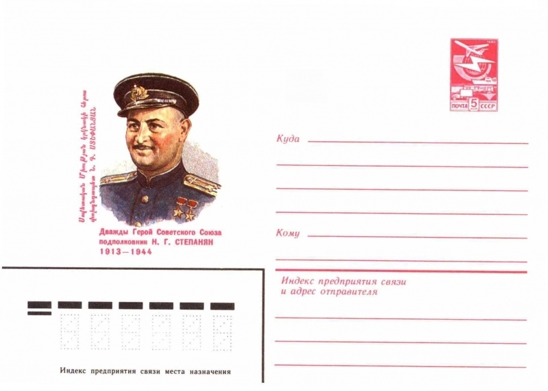 Художественные маркированные конверты 1983 года.